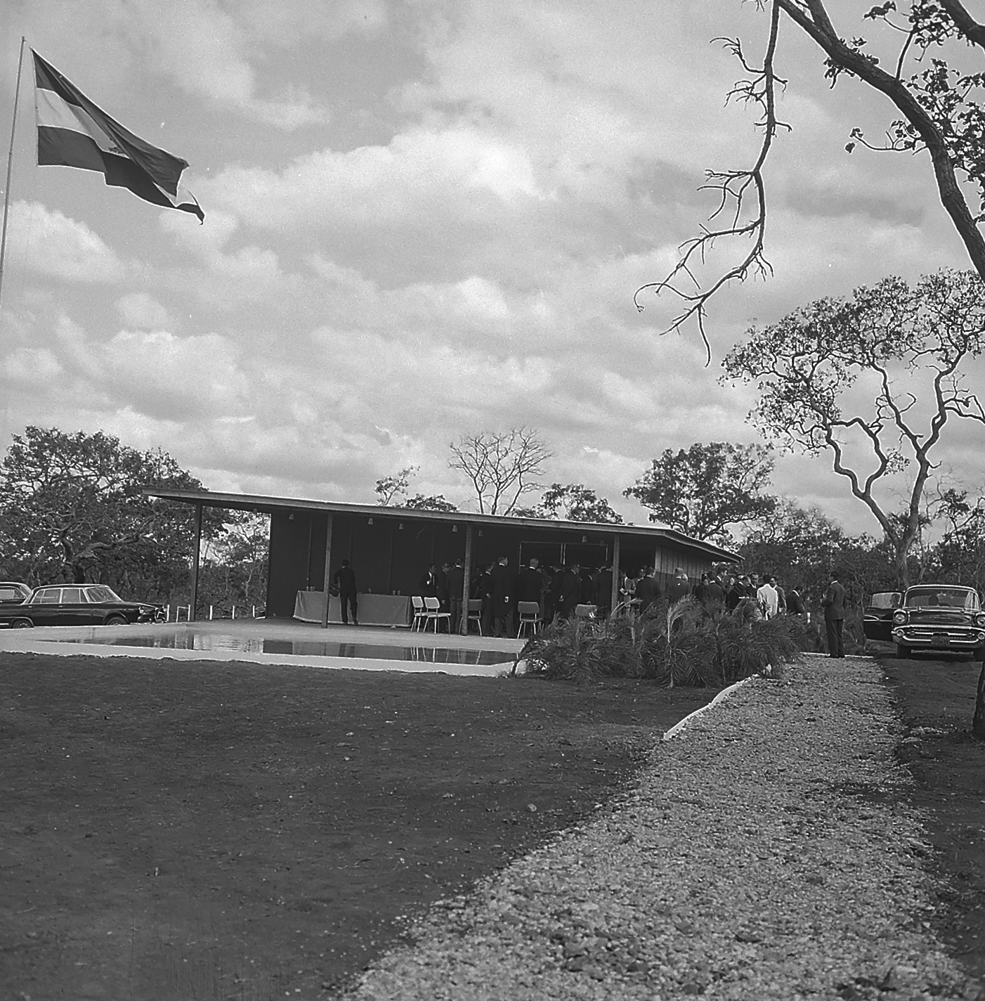 Imagem do Fundo Agência Nacional, do Arquivo Nacional